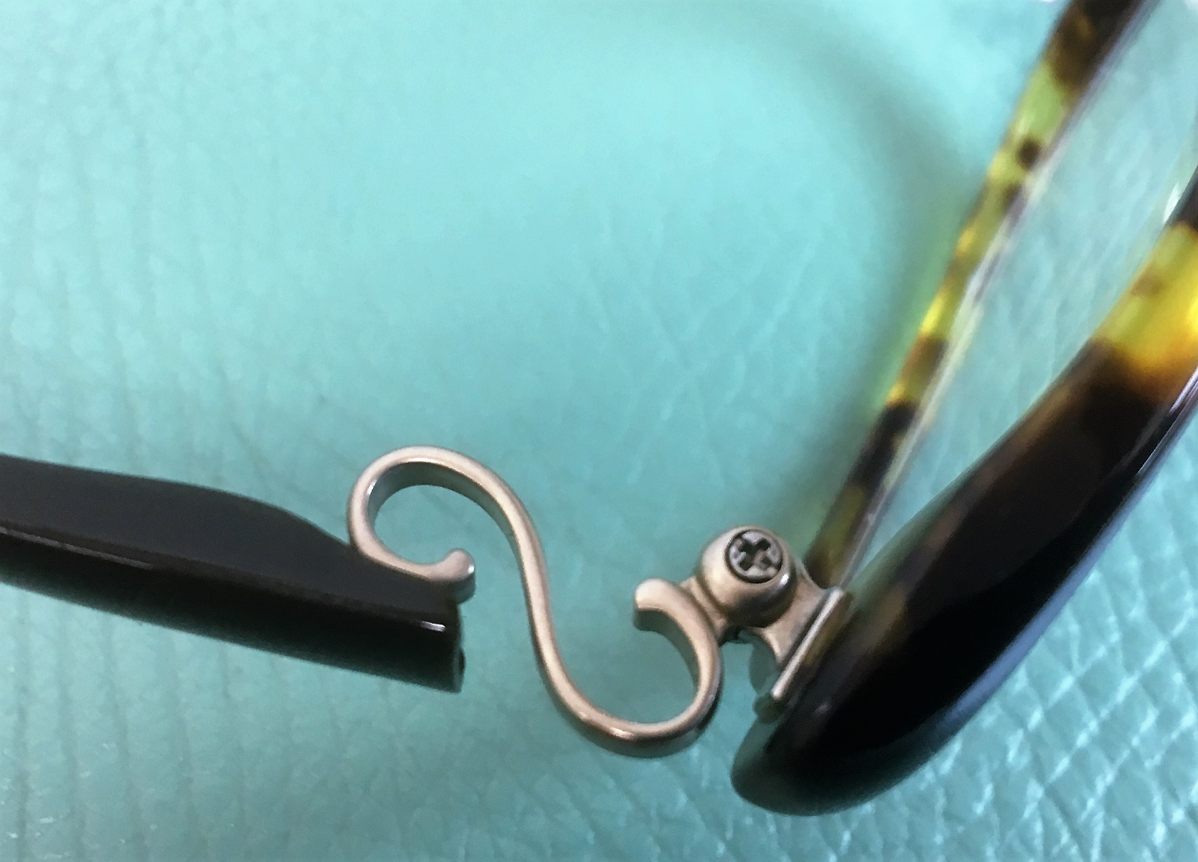 999.9のセルフレーム。蝶番の部分